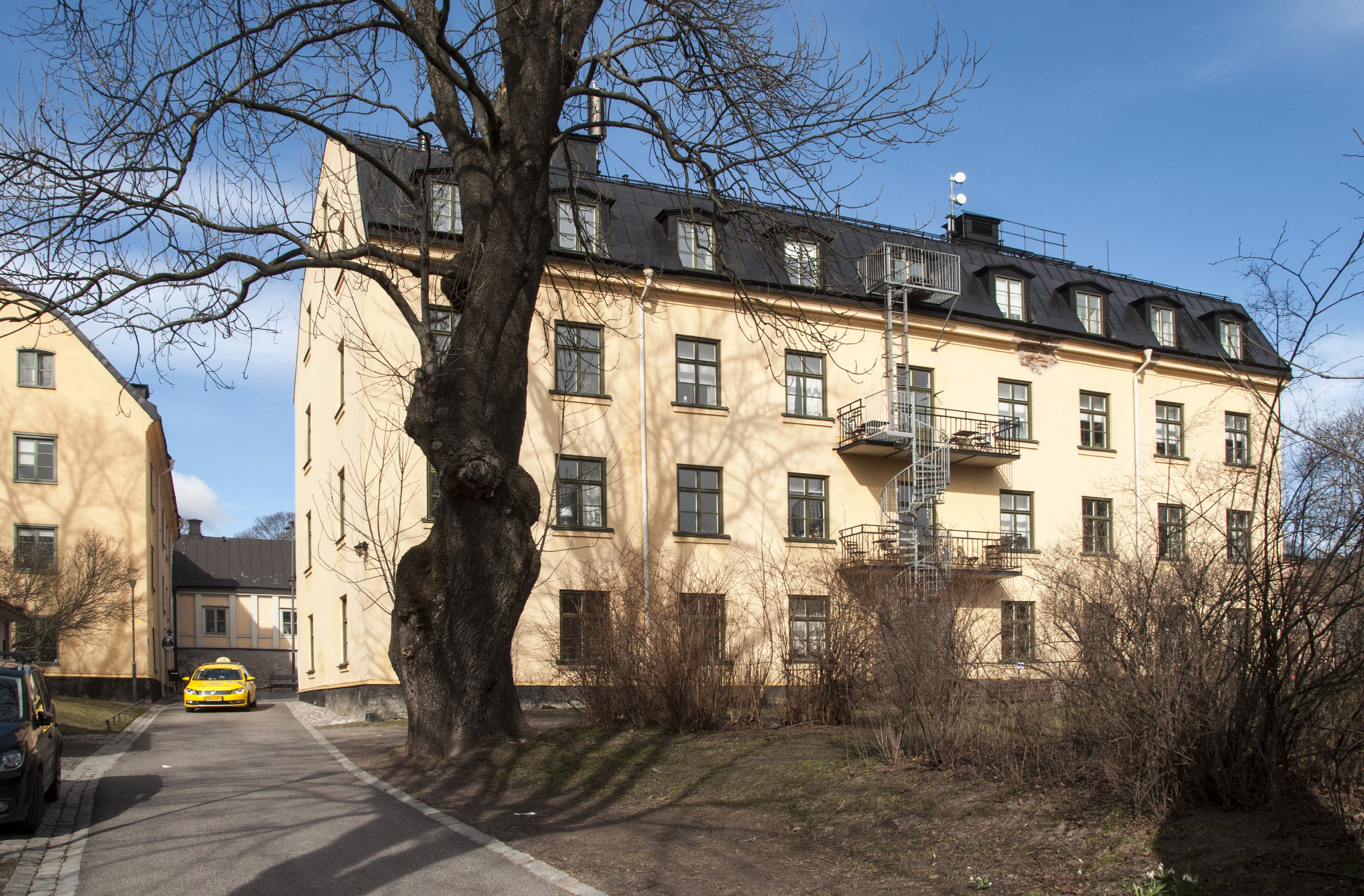 Silverskopan 2, Sabbatsbergsvägen 6, Nybyggnadsår 1812 - 1814. Klarahuset uppfördes ursprungligen som fattighus för Klara församlings fattighjon